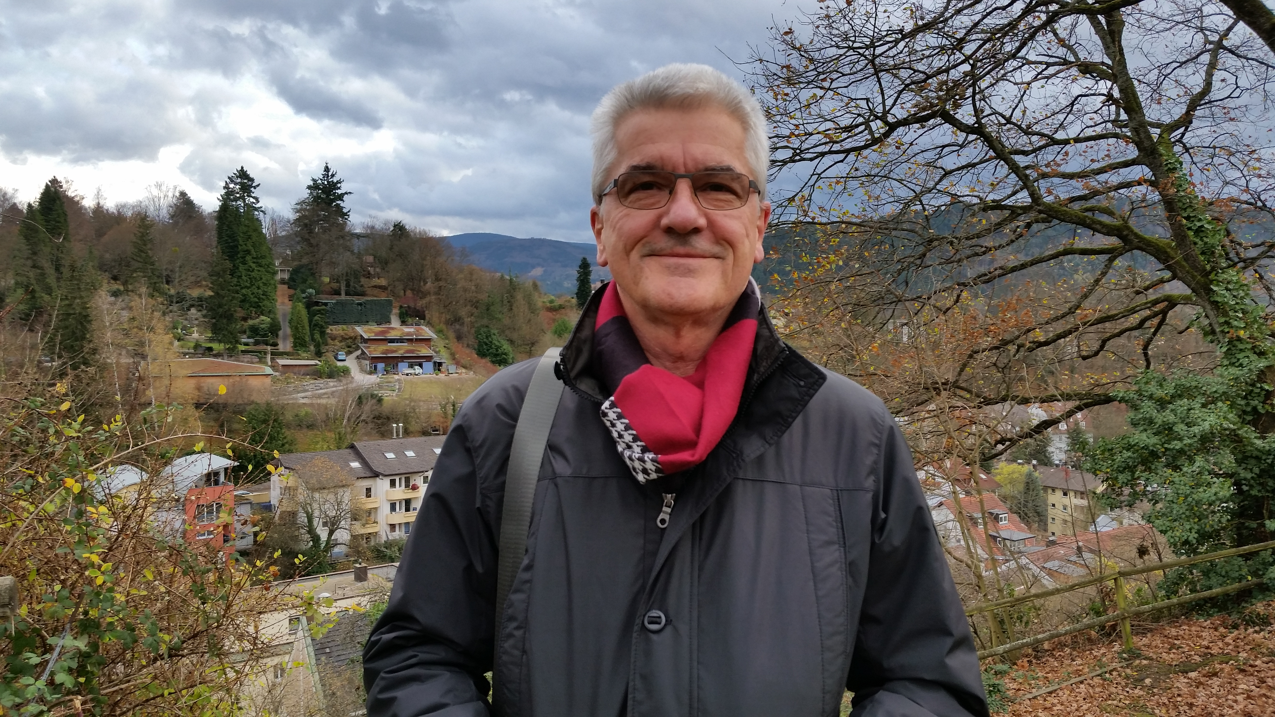 Nach drei Jahren Arbeit als Medienreferent des Thünen-Instituts in Braunschweig entsteht ein neuer Roman